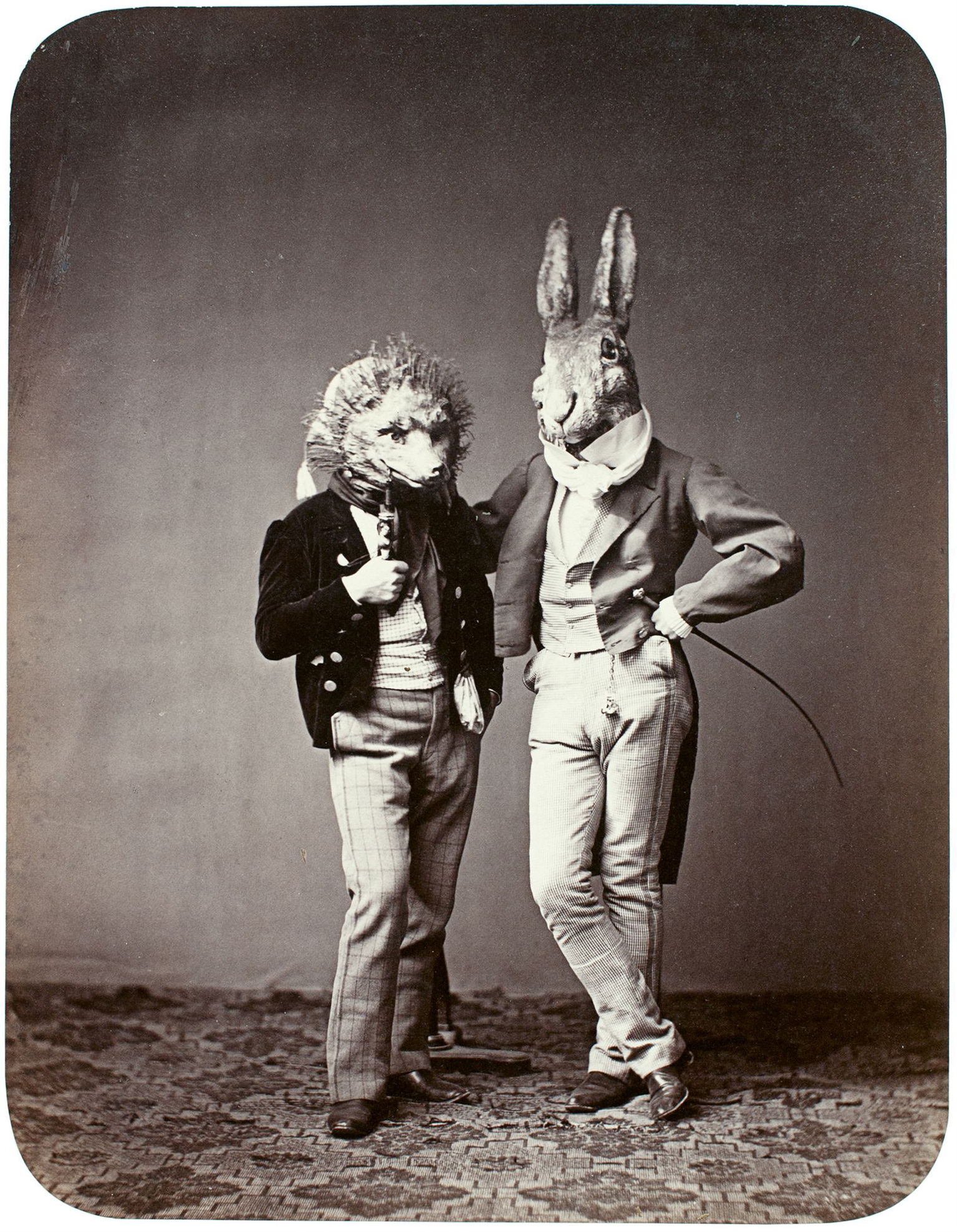 Teilnehmer der Künstlergesellschaft Jung-München an einem Märchenball, Unbekannter und der Bildhauer Hermann Oehlmann, den Wettlauf des Igels und des Hasen darstellend, München, 1862 Albuminpapier